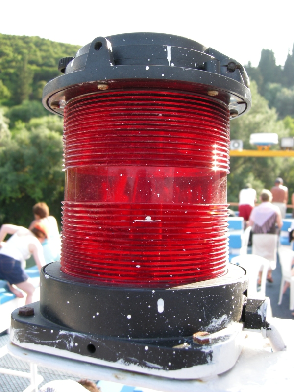 Rode navigatielamp met fresnellenzen